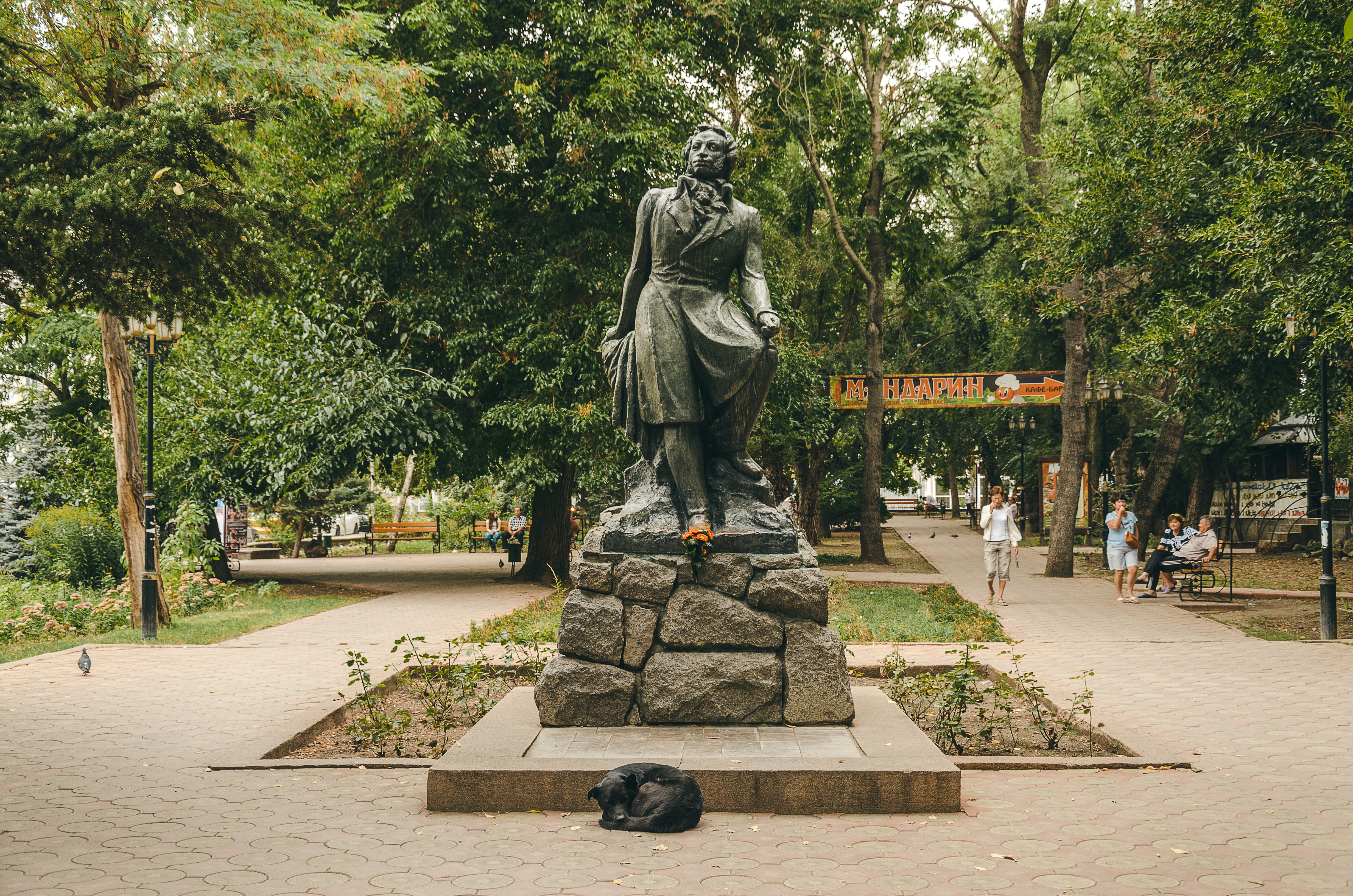 Памятник А.С.Пушкину. Дата события: 1820 г. Дата сооружения: 1974 г.: улица Войкова, сквер, Феодосия, Крым This object is located on the Crimean Peninsula and recognized as cultural heritage by both Russia and Ukraine under the monument ID: 8231406000/ 01-116-0015, respectively. The legal status of the Crimean region is currently disputed.